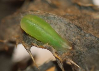 Puppe von Melanostoma sp. am 12.12.2017 in Walldorf/Baden